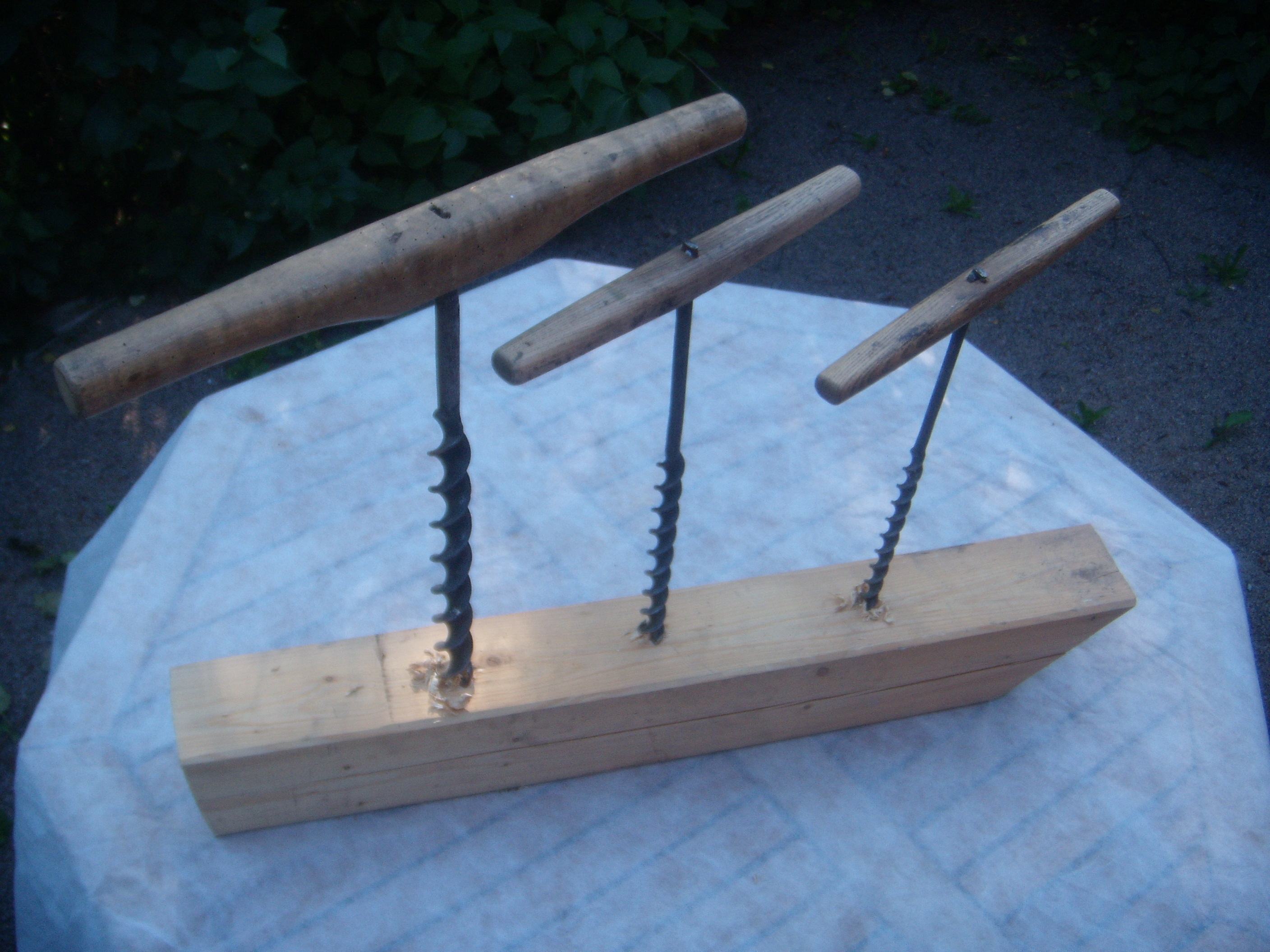 Navare, tre olika.